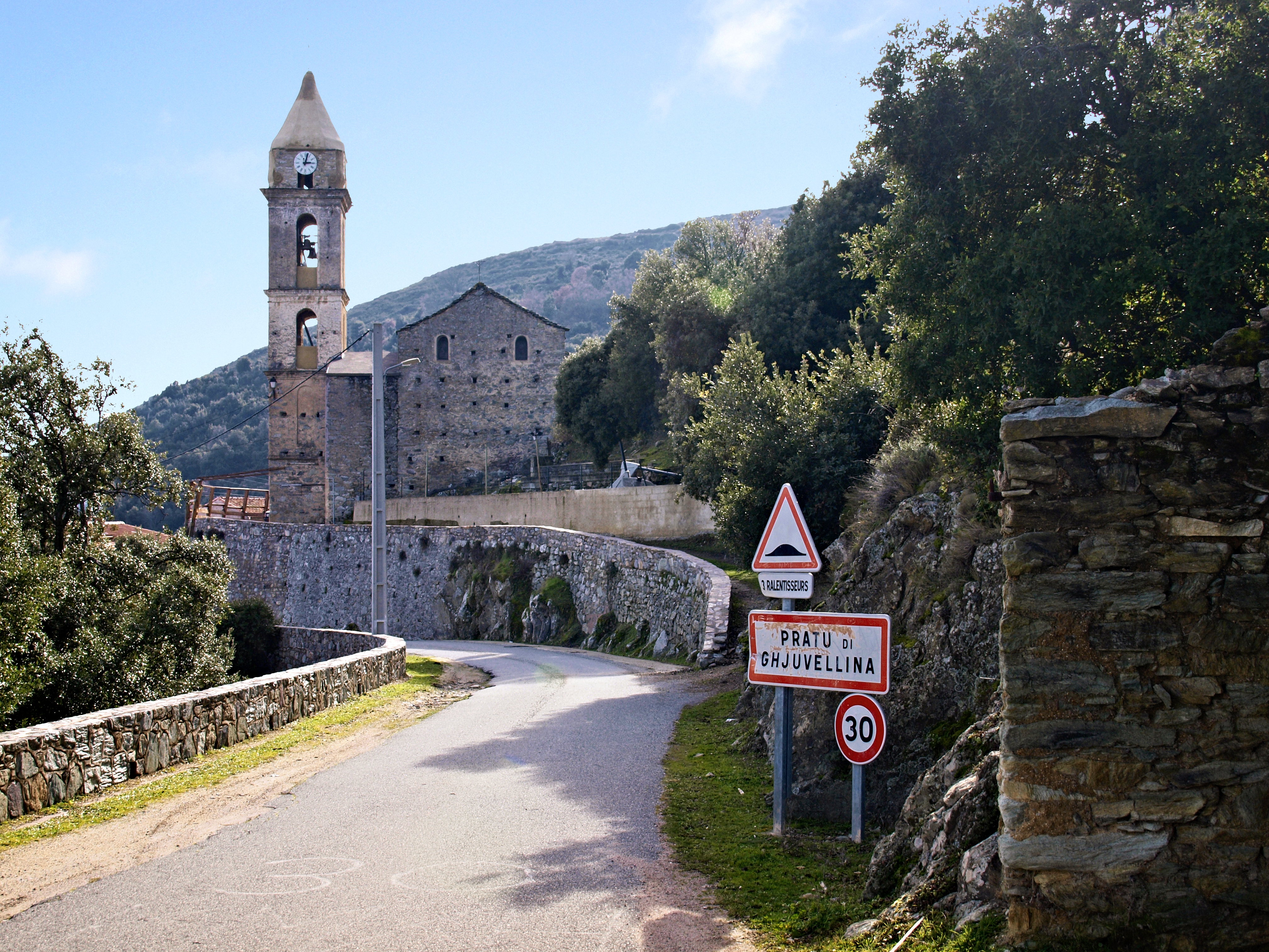 Prato-di-Giovellina (Corsica) - Entrée du village